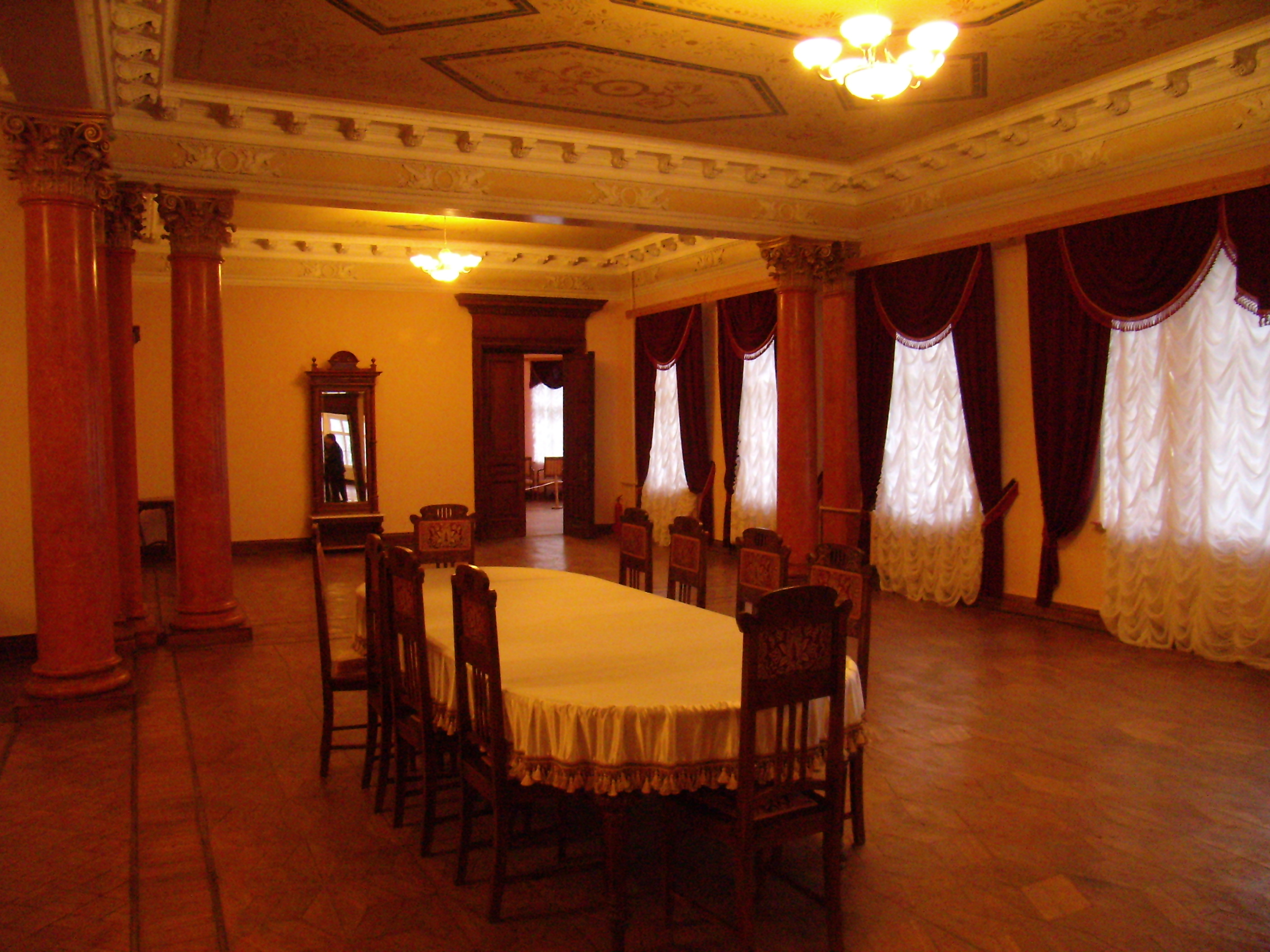 Палац (мур.), Качанiвка